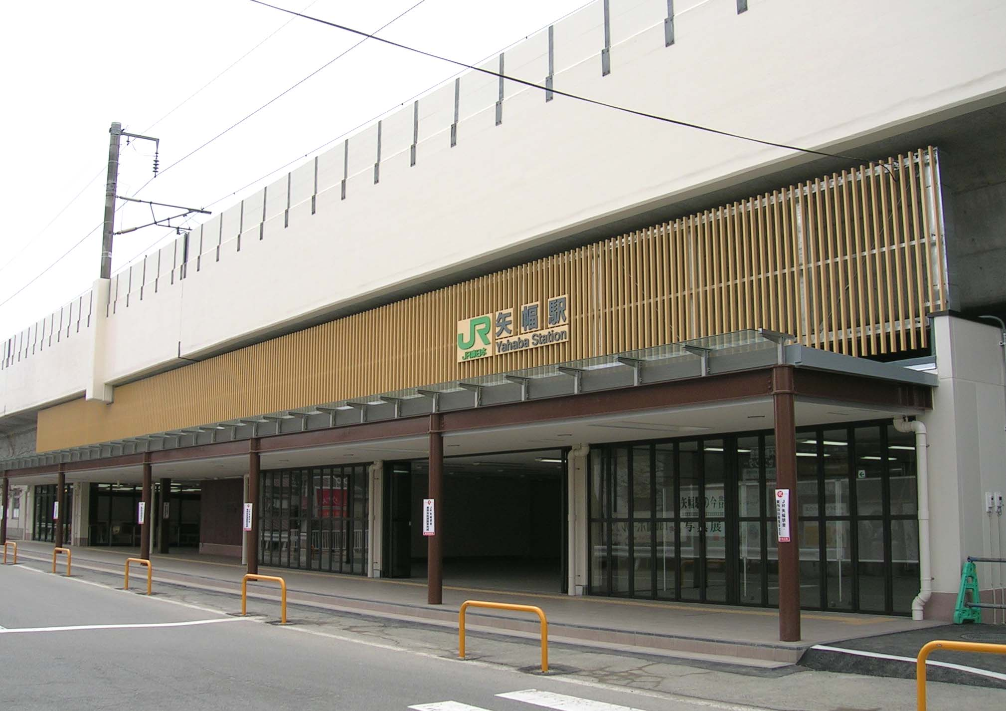 Yahaba Station, Yahaba, Iwate, Japan